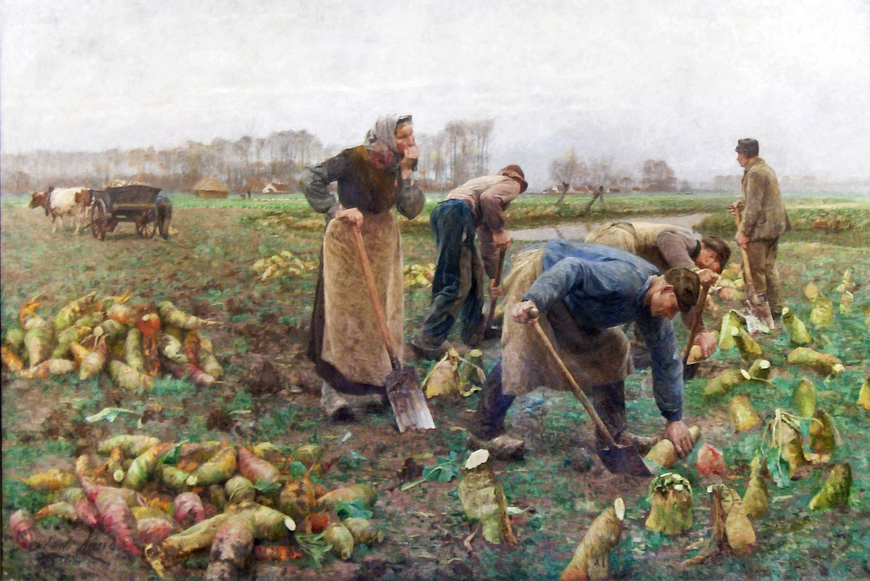 "Bietenoogst" (1890) – olie op doek door Emile Claus; 320 x 480 cm; Museum van Deinze en de Leiestreek, België